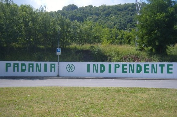 Scritta "Padania indipendente" su un muro vicino al prato dove si svolgono i Raduni della Lega Nord a Pontida.